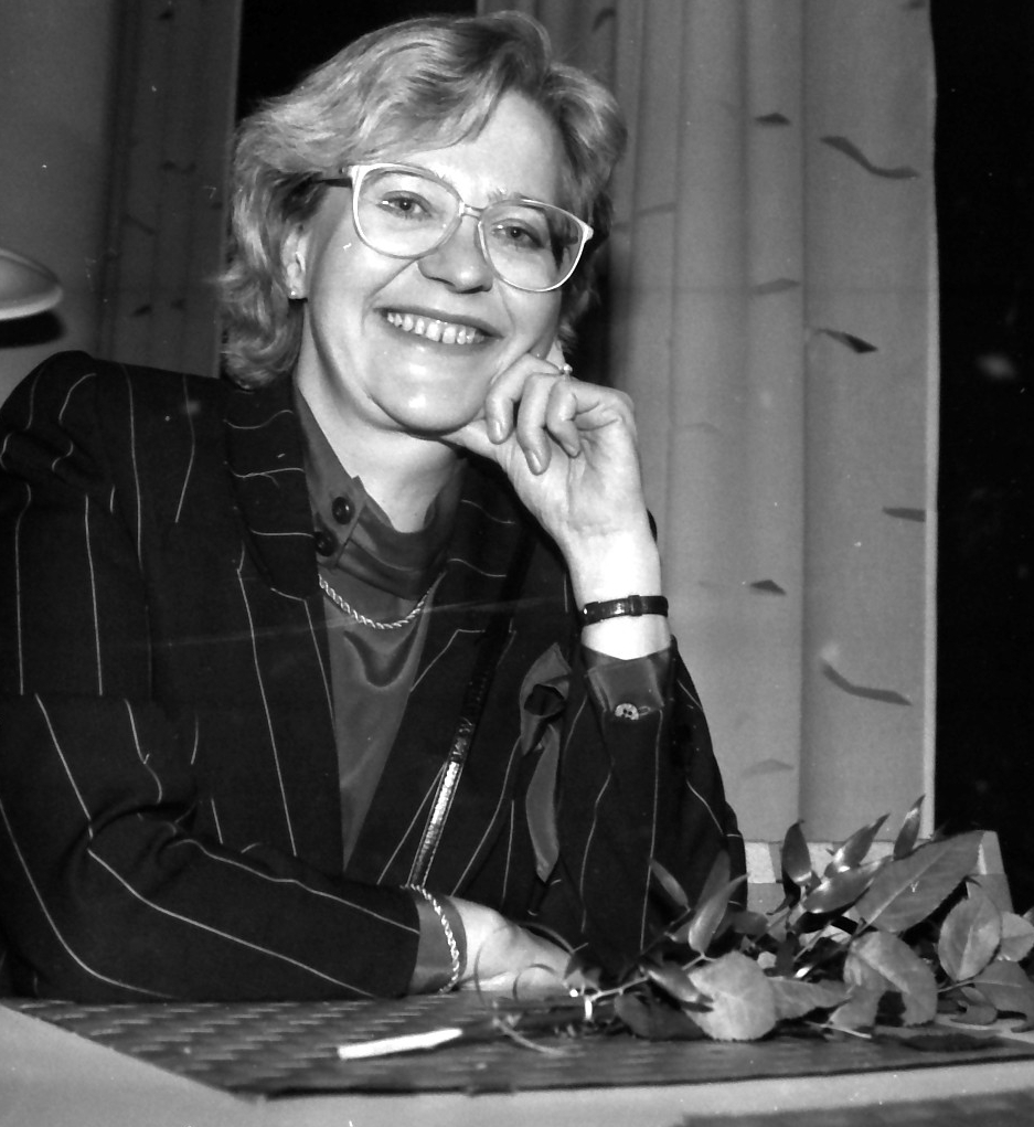 Ulpu Iivari, Kuusankoskitalo 1988